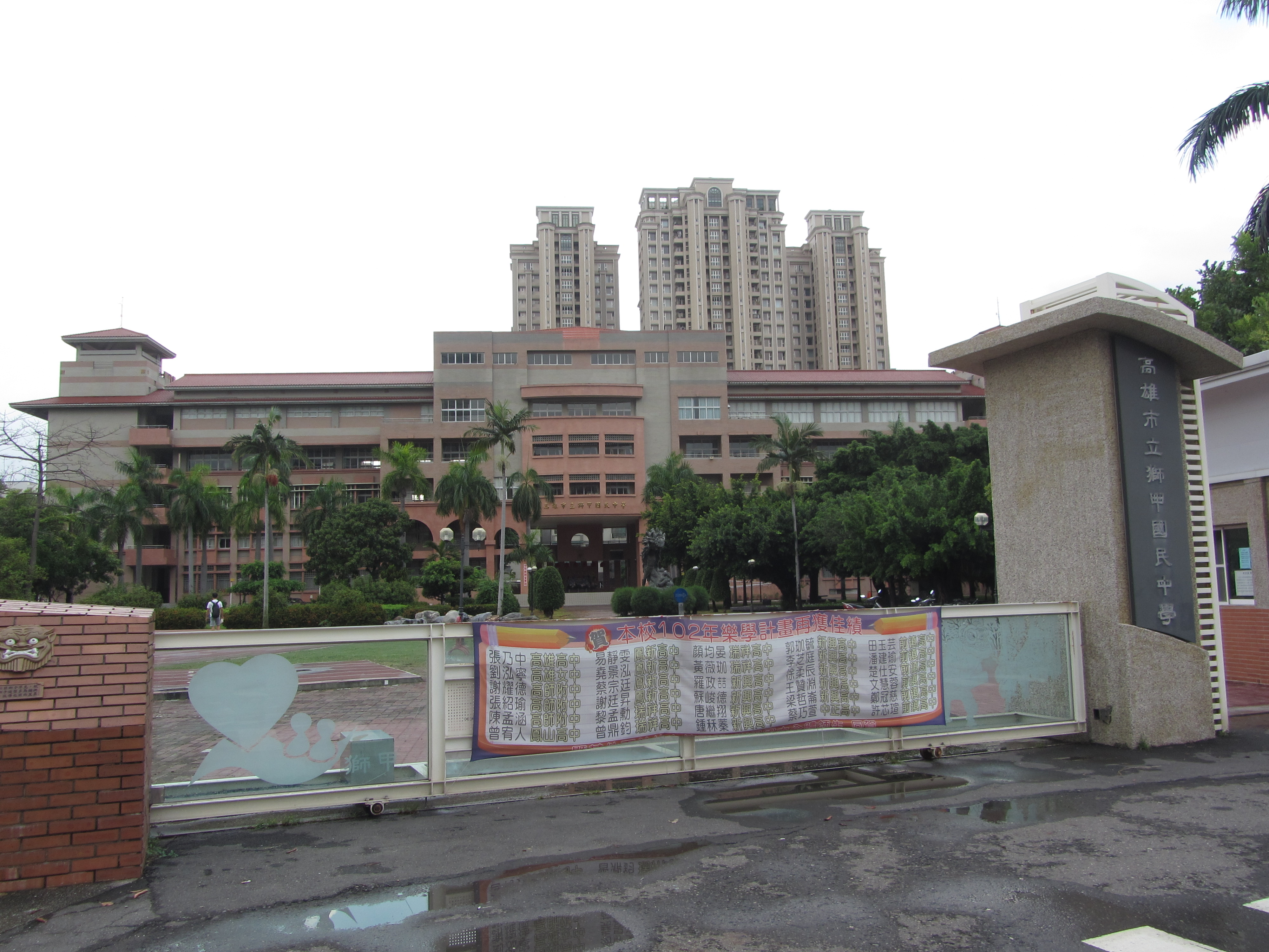 高雄市立獅甲國民中學。